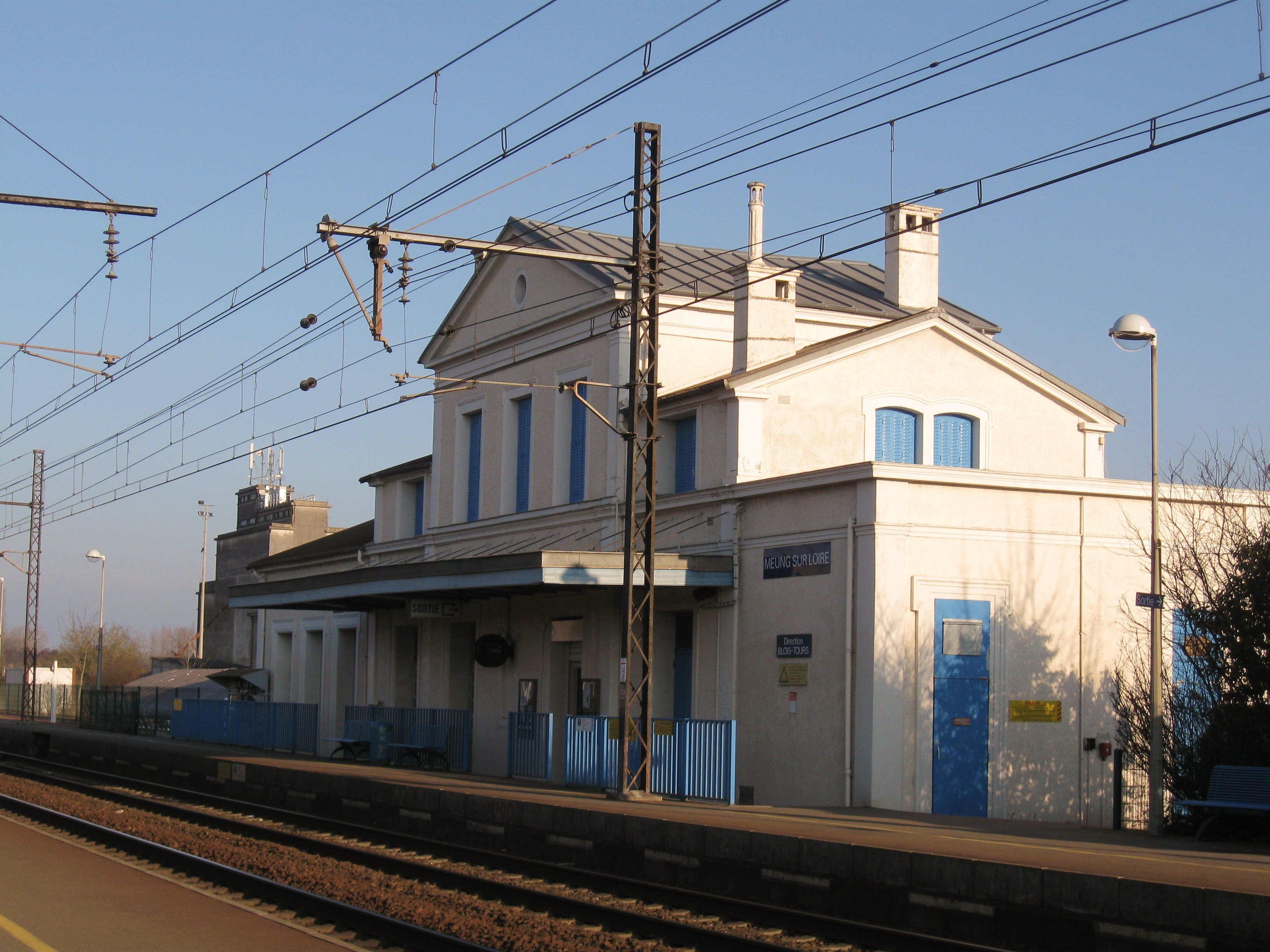 Gare de Meung-sur-Loire, Loiret, France